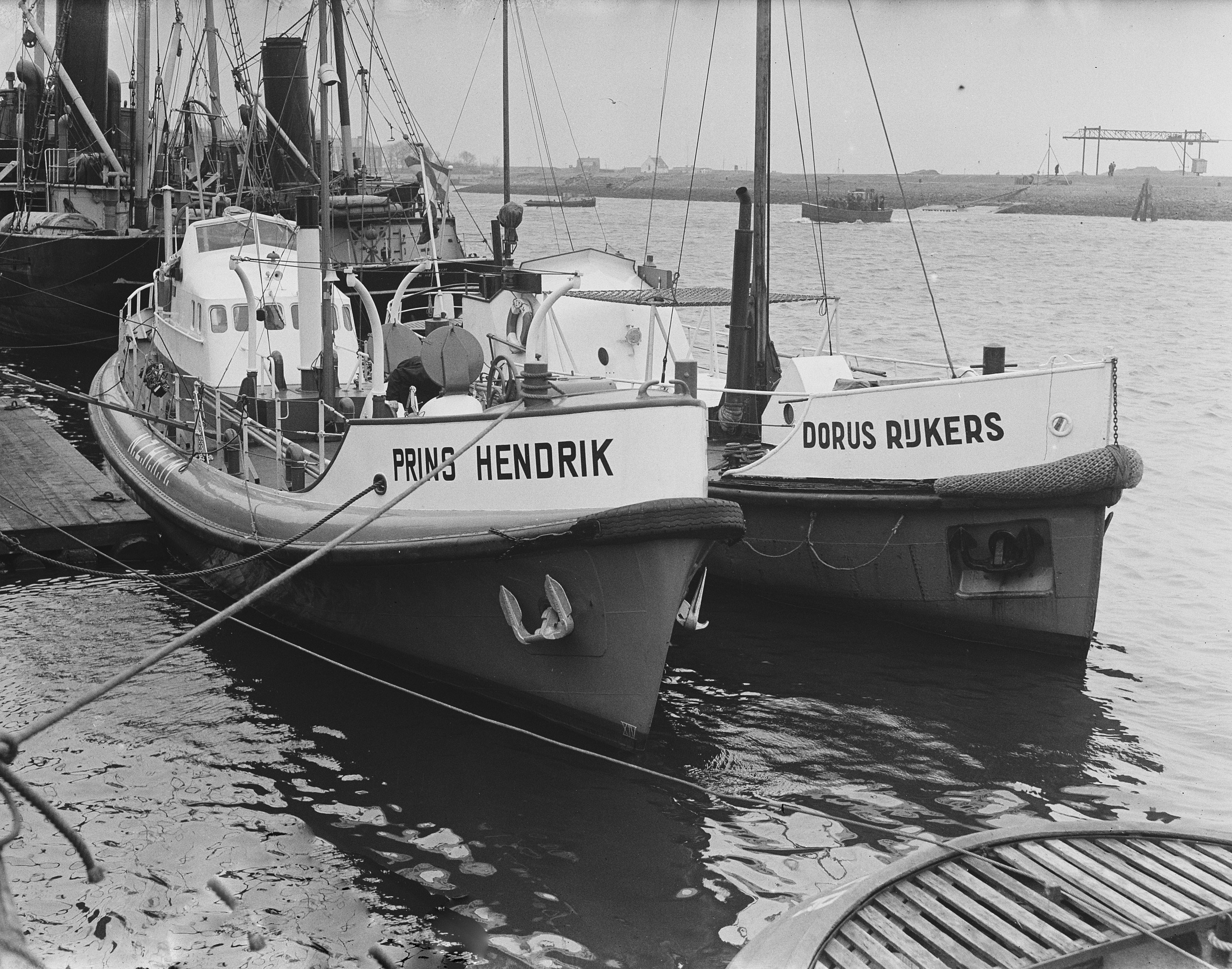 Collectie / Archief : Fotocollectie Anefo Reportage / Serie : [ onbekend ] Beschrijving : Overdracht " Prins Hendrik", de nieuwe reddingboot Den Helder. Hier samen op de foto met het oude schip " Dorus Rijkers" uit 1923 Datum : 8 maart 1952 Locatie : Den Helder, Noord-Holland Trefwoorden : reddingsboten Fotograaf : Duinen, […] van / Anefo Auteursrechthebbende : Nationaal Archief Materiaalsoort : Glasnegatief Nummer archiefinventaris : bekijk toegang 2.24.01.09 Bestanddeelnummer : 904-9987